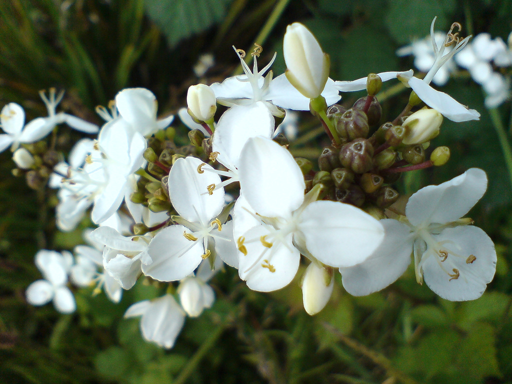 Flor de Libertia chilenensis